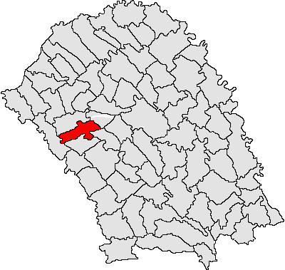 Categorie:Hărţi ale judeţului Botoşani